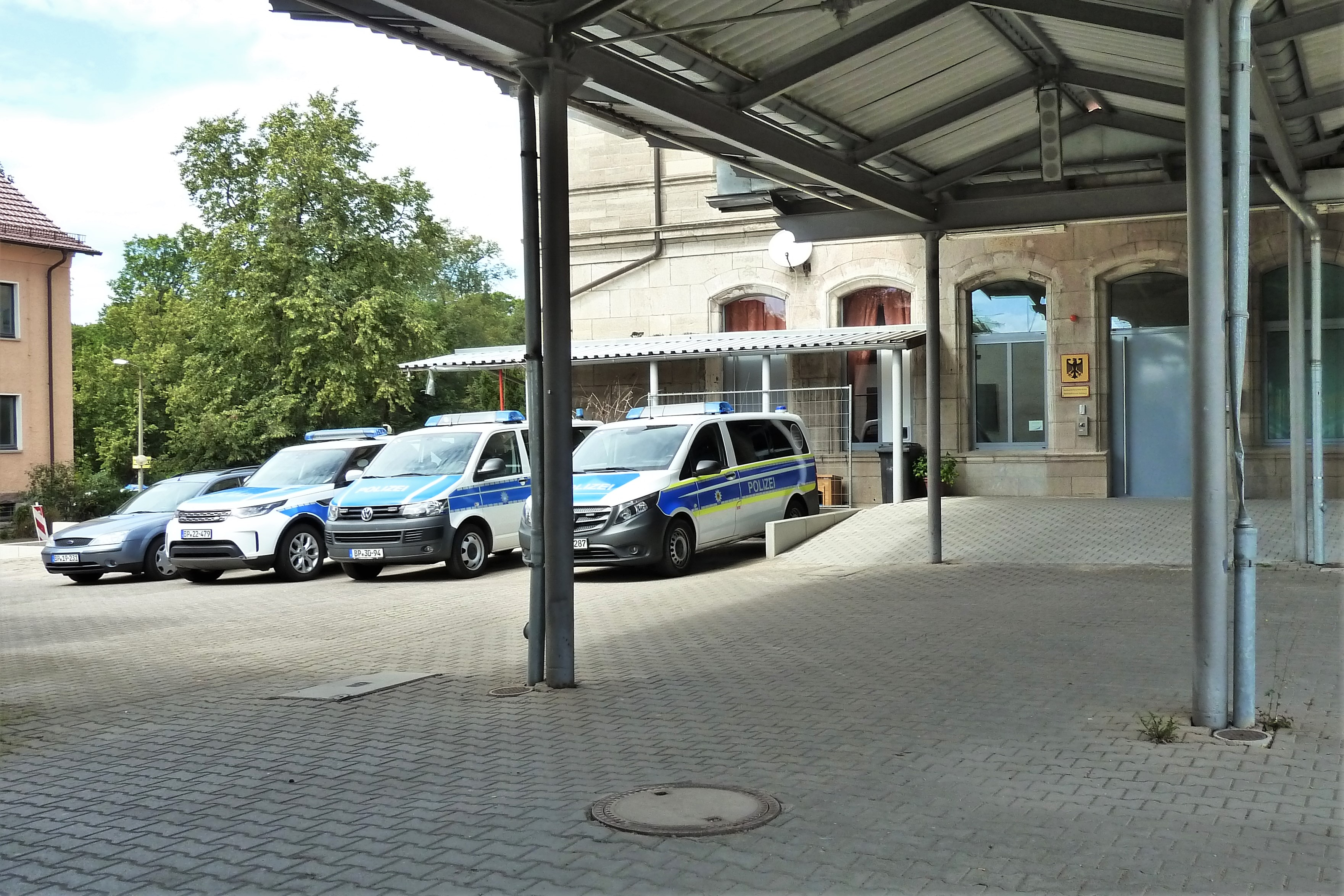 Bundespolizei-Revier im Bahnhof Meiningen